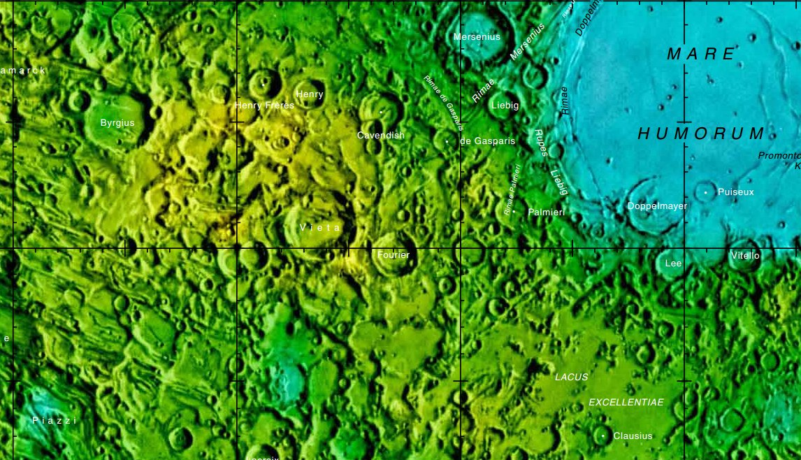 Cráter lunar Fourier. (Imagen LRO)